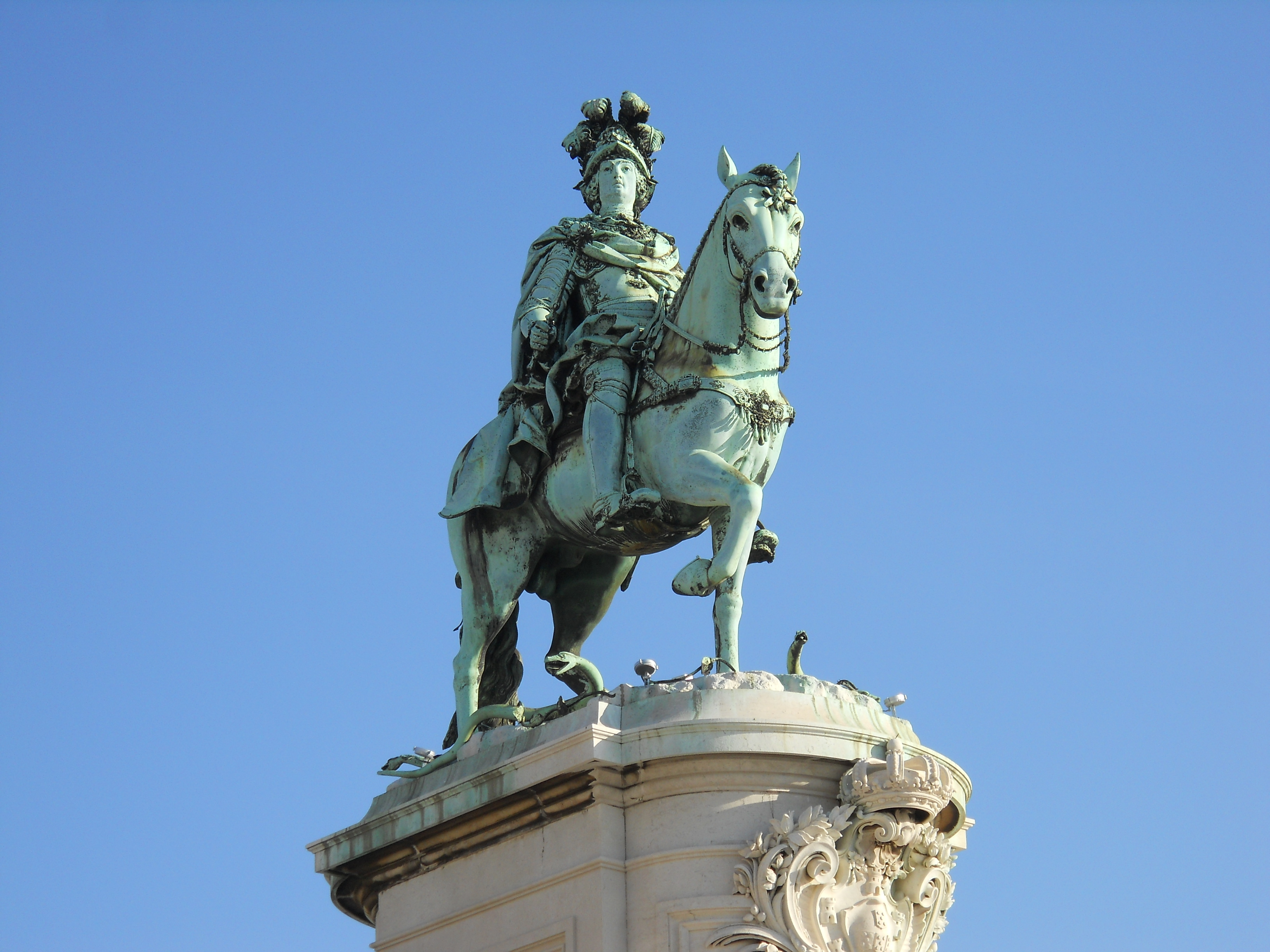 Lisbon Portugal 485